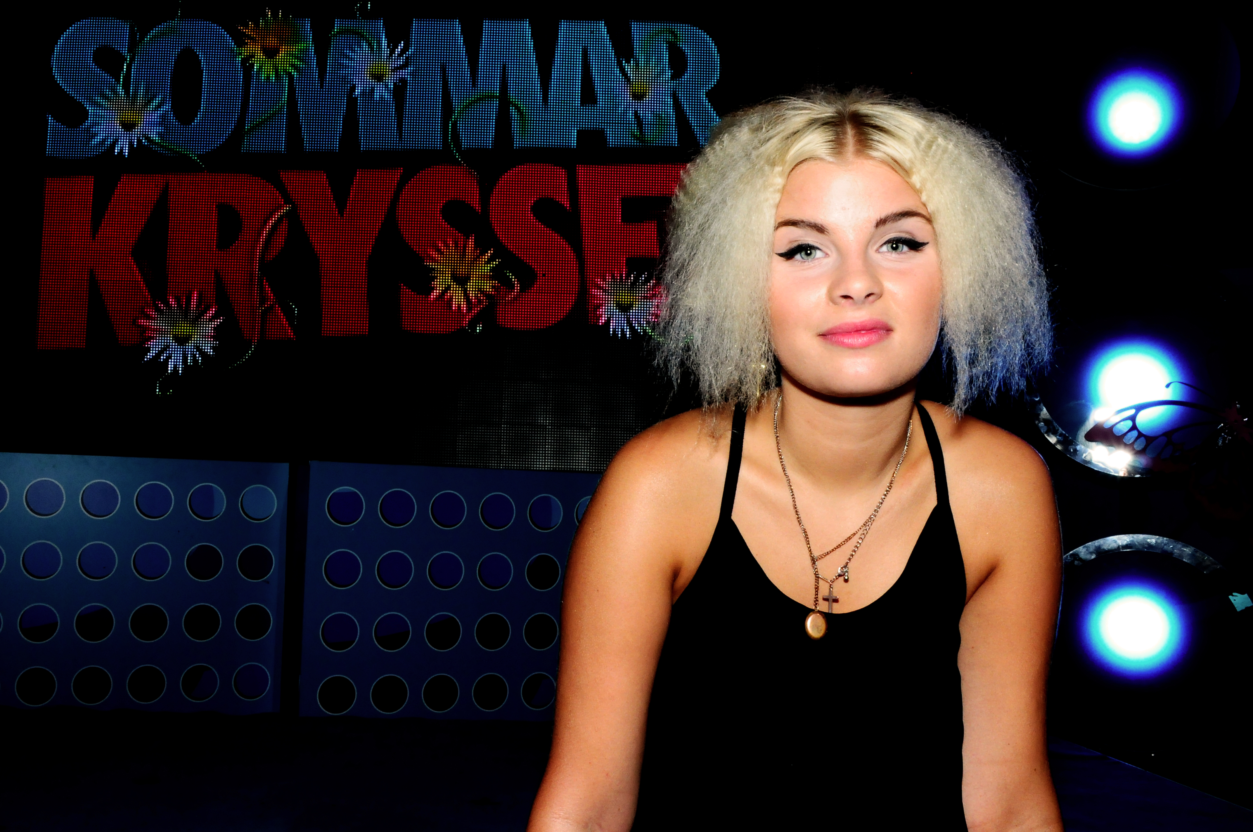 Amanda Fondell På Sommarkrysset